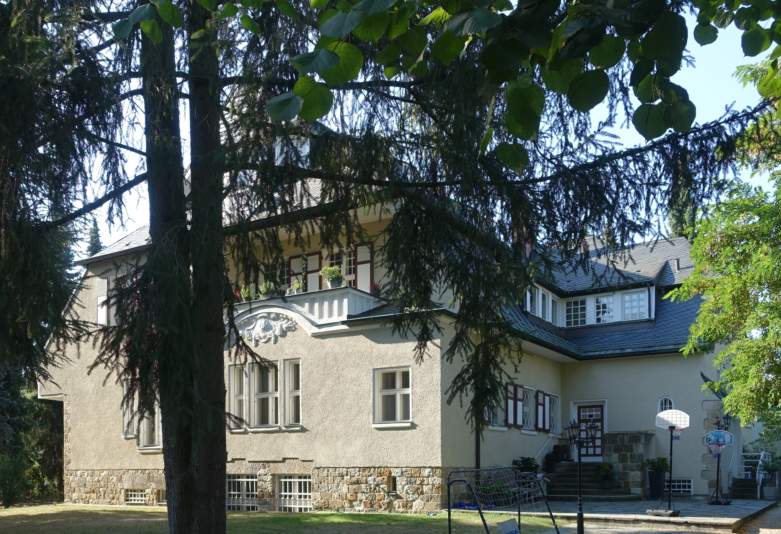 Wohnhaus